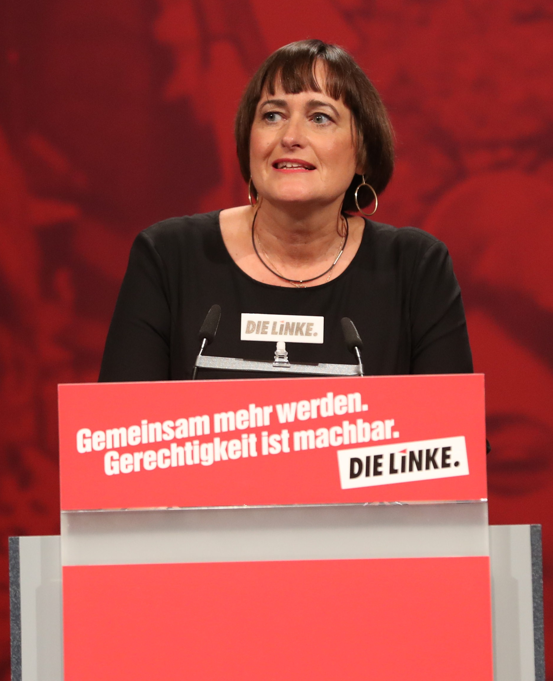 Bundesparteitag Die Linke 2018 in Leipzig